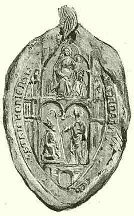 Telegdi Csanád esztergomi érsek pecsétje